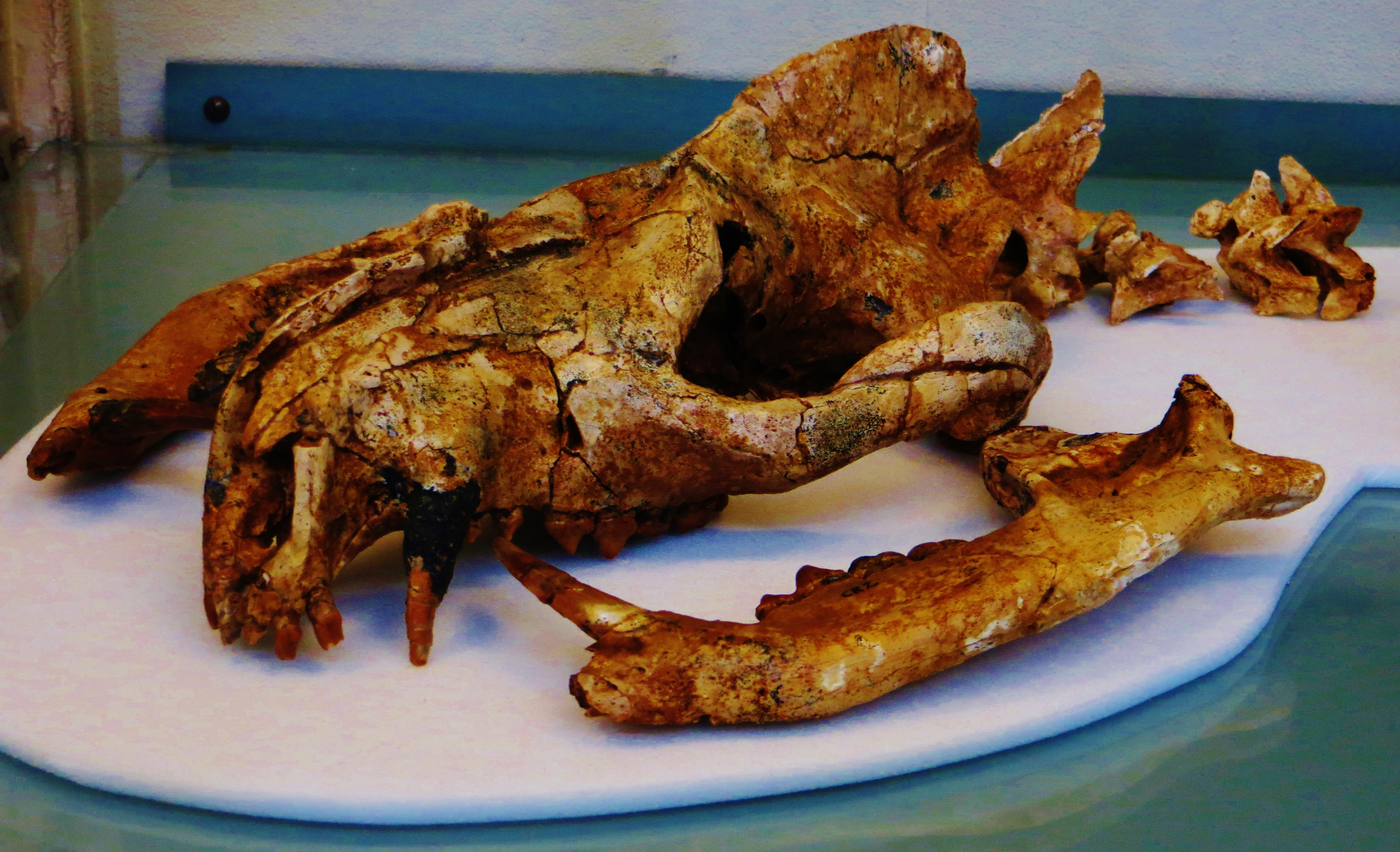 Fossil of Arctocyon, an extinct mammal- Took the photo at Museum Histoire Naturelle, Paris